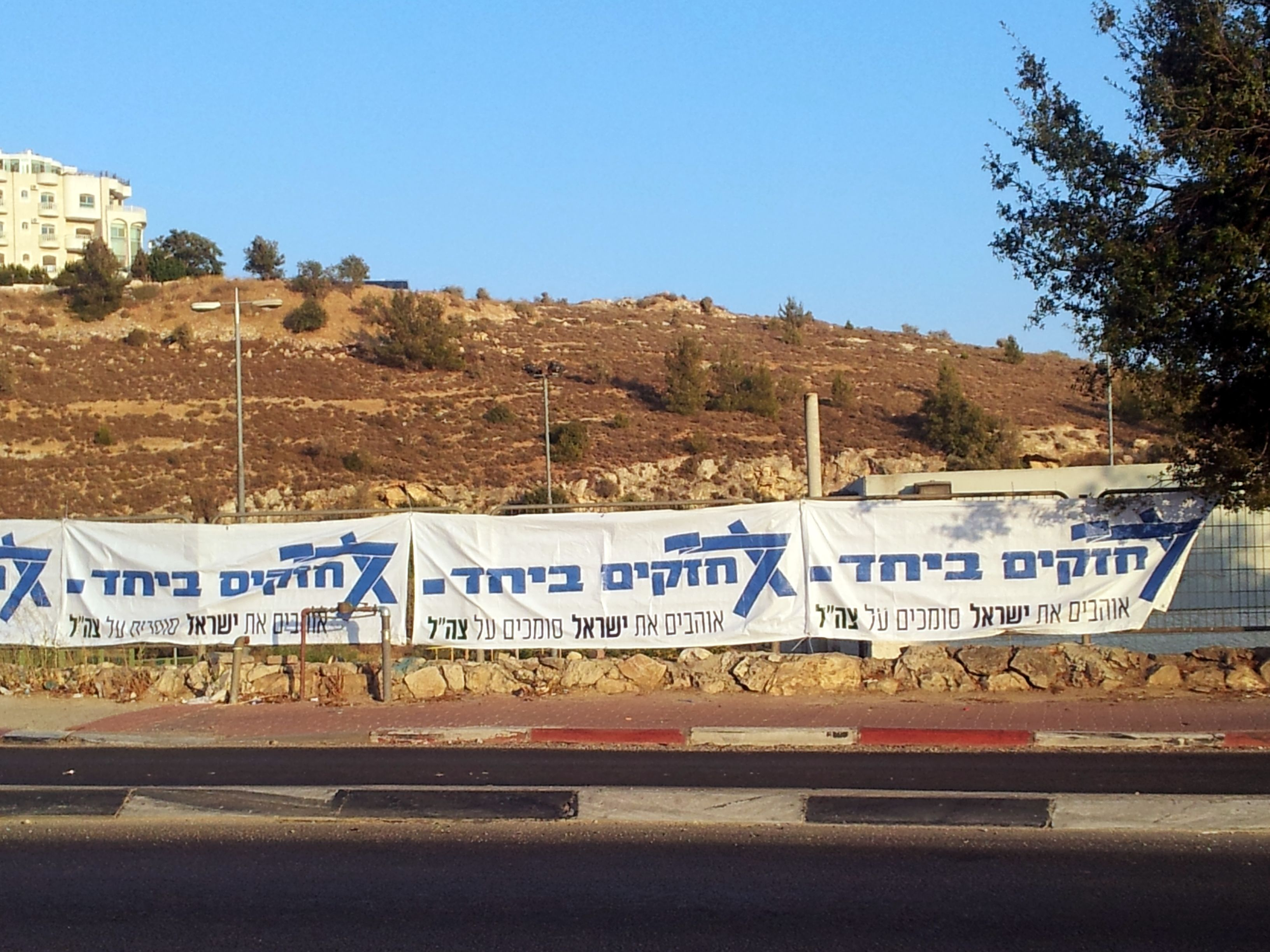 שלט דרך במבצע "צוק איתן" יולי 2014